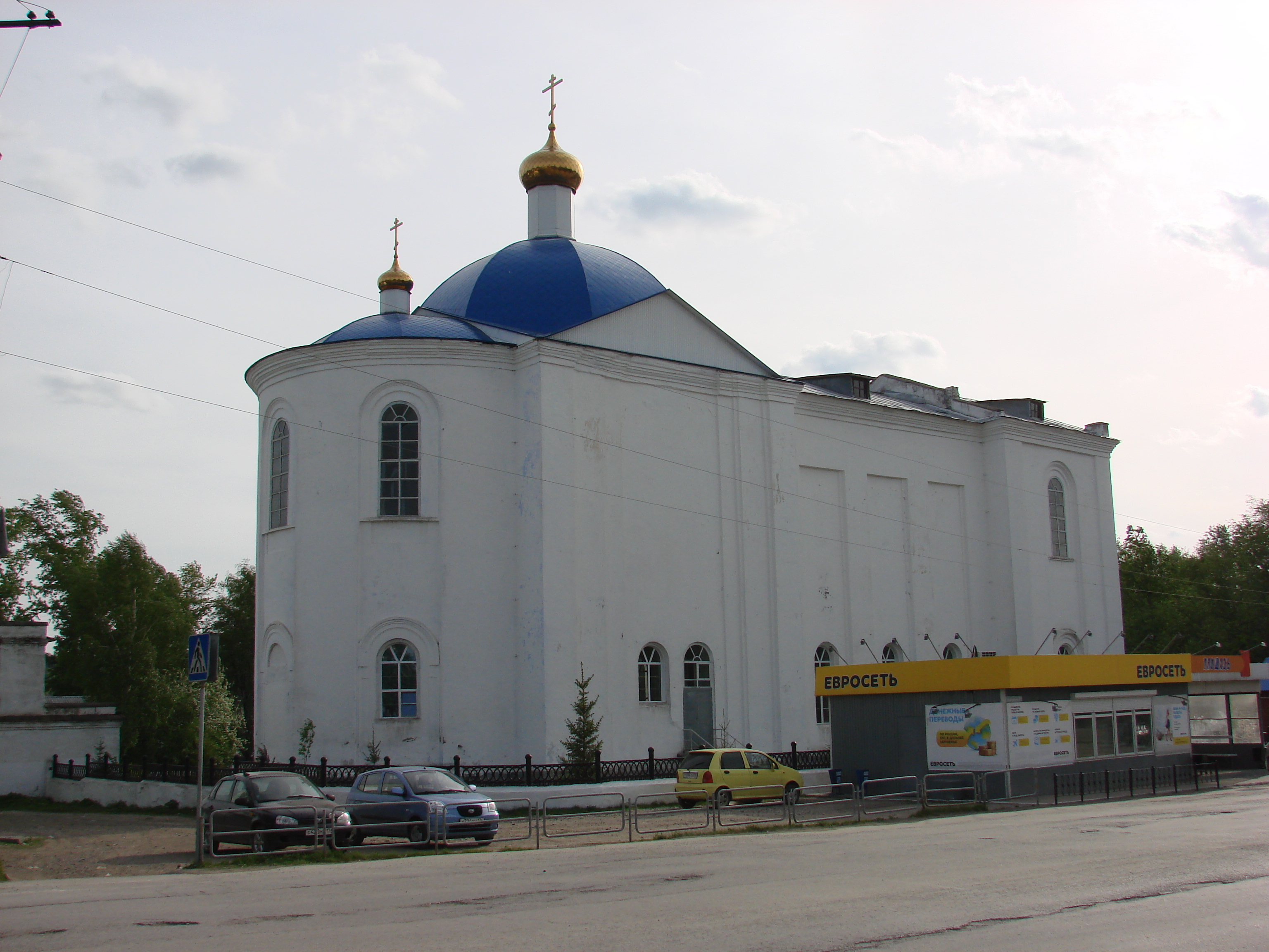 Нязепетровск, ул. Свердлова 2